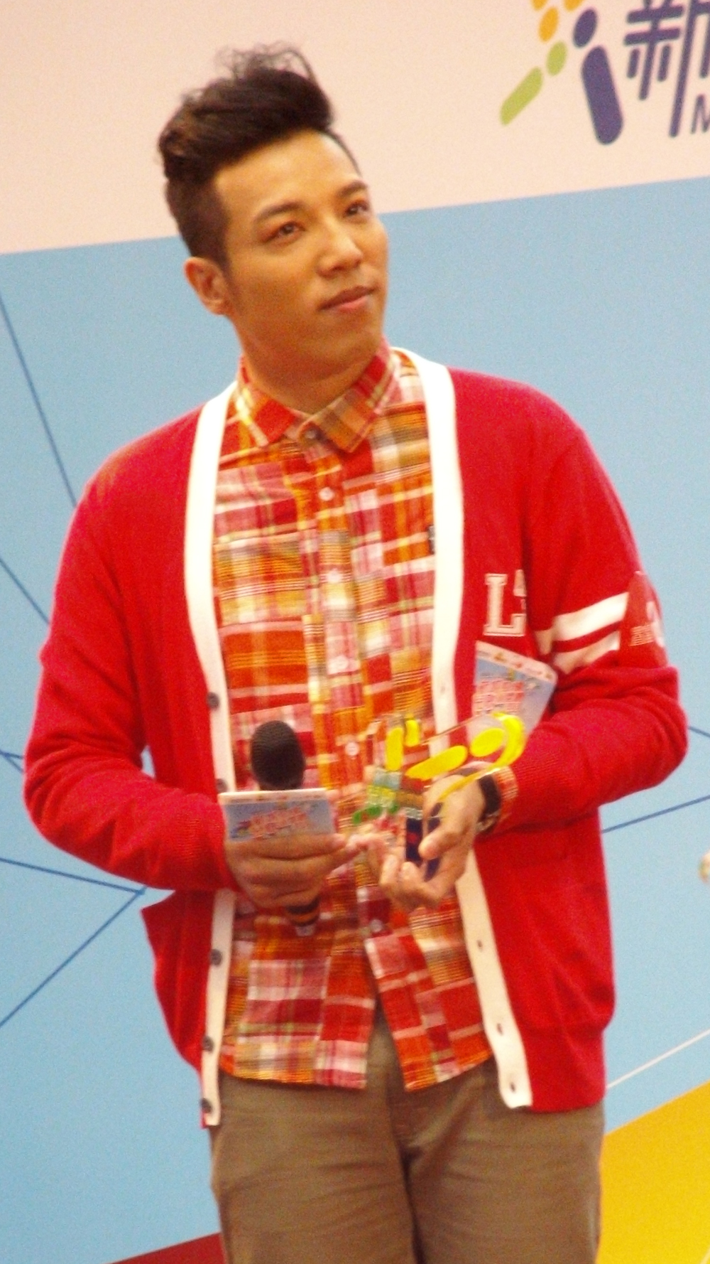 中文（香港）: 鄭世豪的樣子